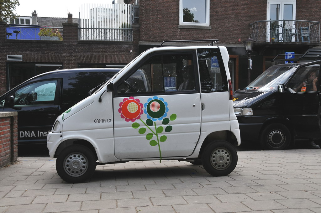 Canta (vervoermiddel)